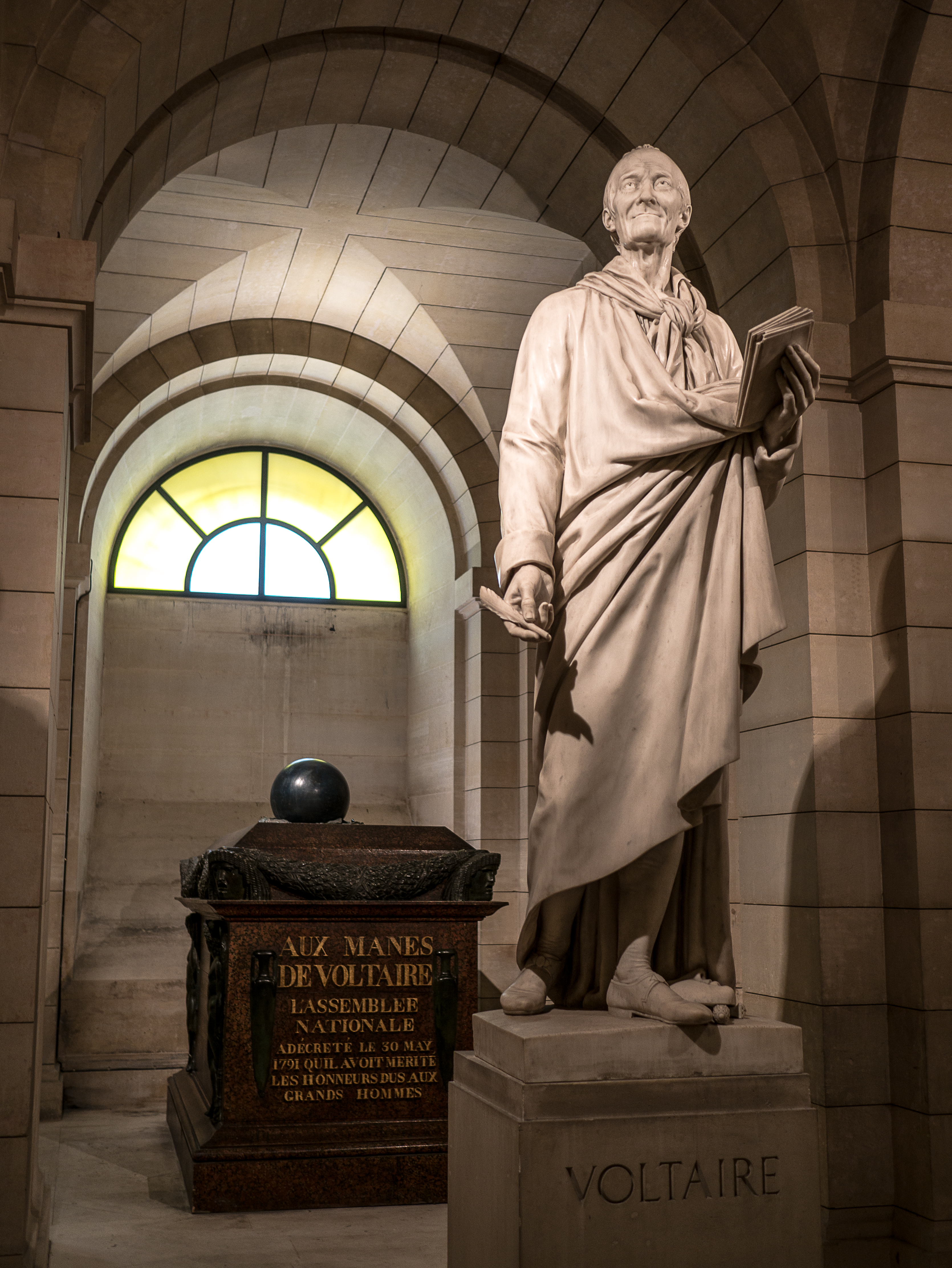 Panthéon - Paris